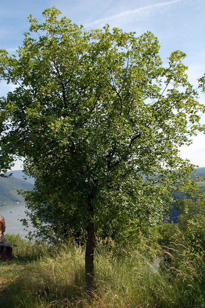 Acer monspessulanum, Kaub, Rheinland-Pfalz, Rhine Gorge, Germany